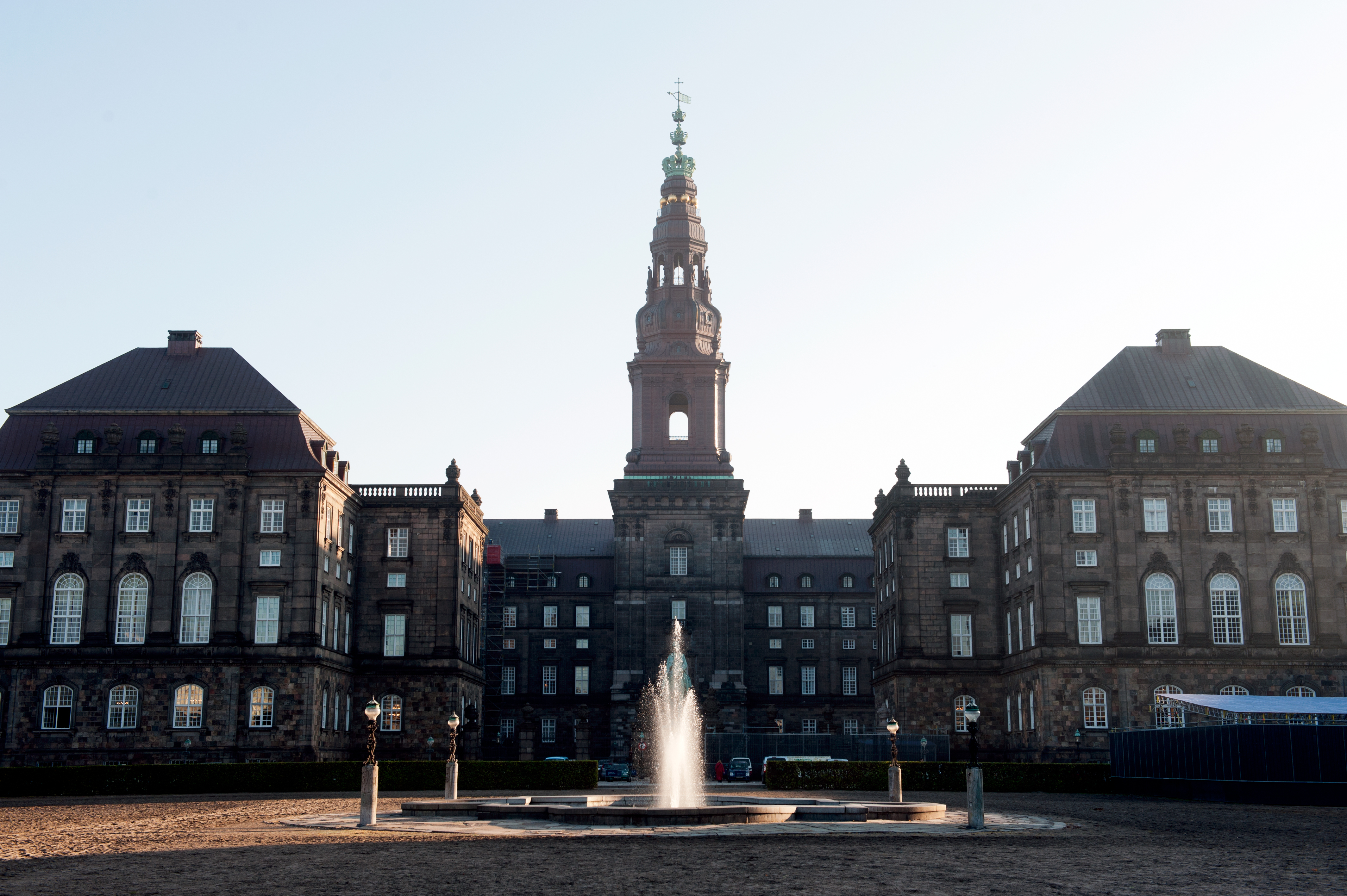 Christiansborg Köpenhamn Danmark Data-uid: 09fa89d0-8d97-4915-88b9-d88d47bd1e76